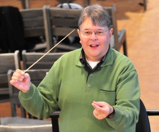 Karl Rathgeber, Dirigent